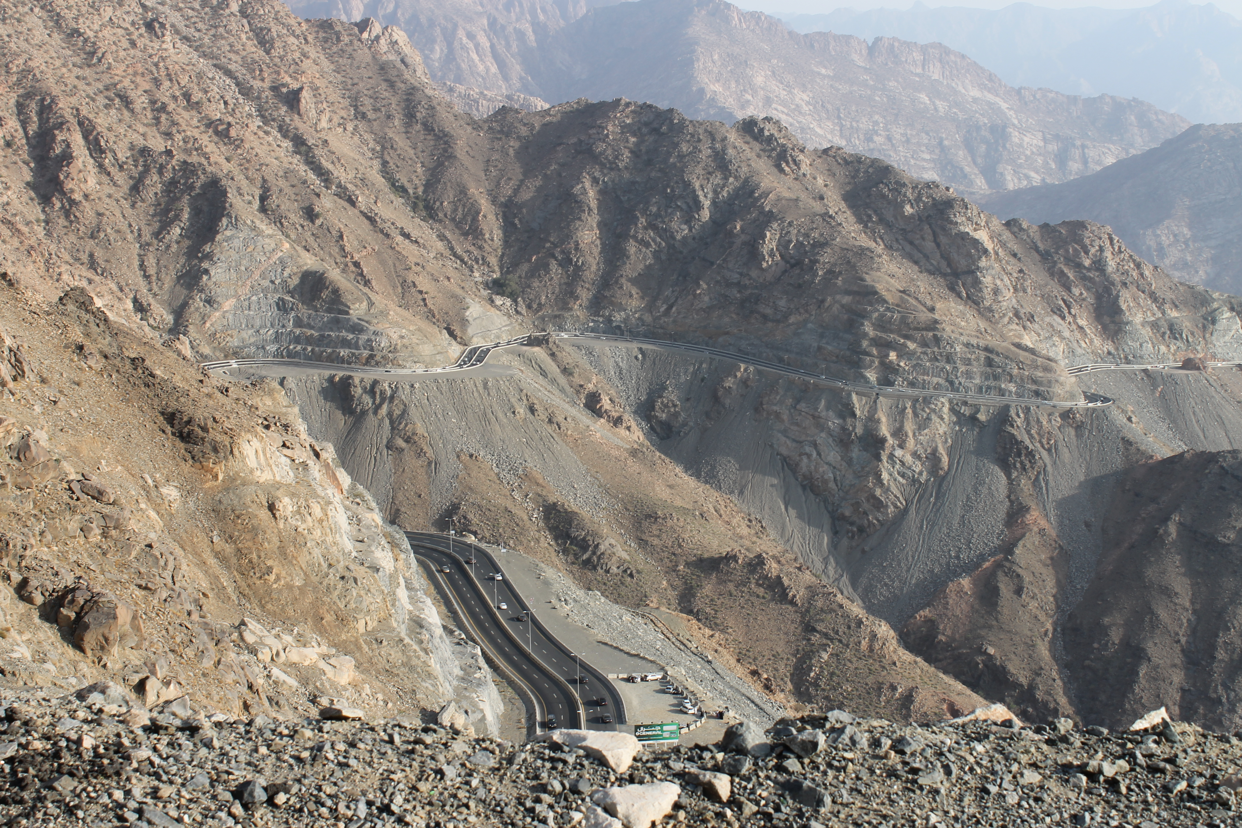 طريق جبل الطائف.